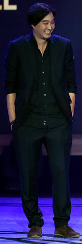 Rocketbeans TV (Daniel Budiman, Nils Bomhoff, Arno Heinisch, Simon Krätschmer, Etienne Gardé) bei der Verleihung des Webvideopreises 2015